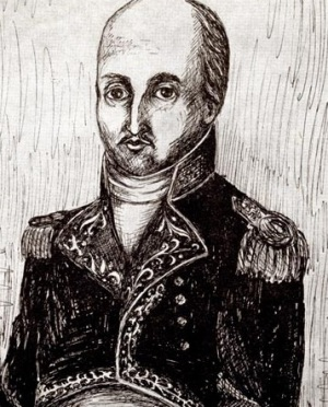 Portrait du général Ferrand